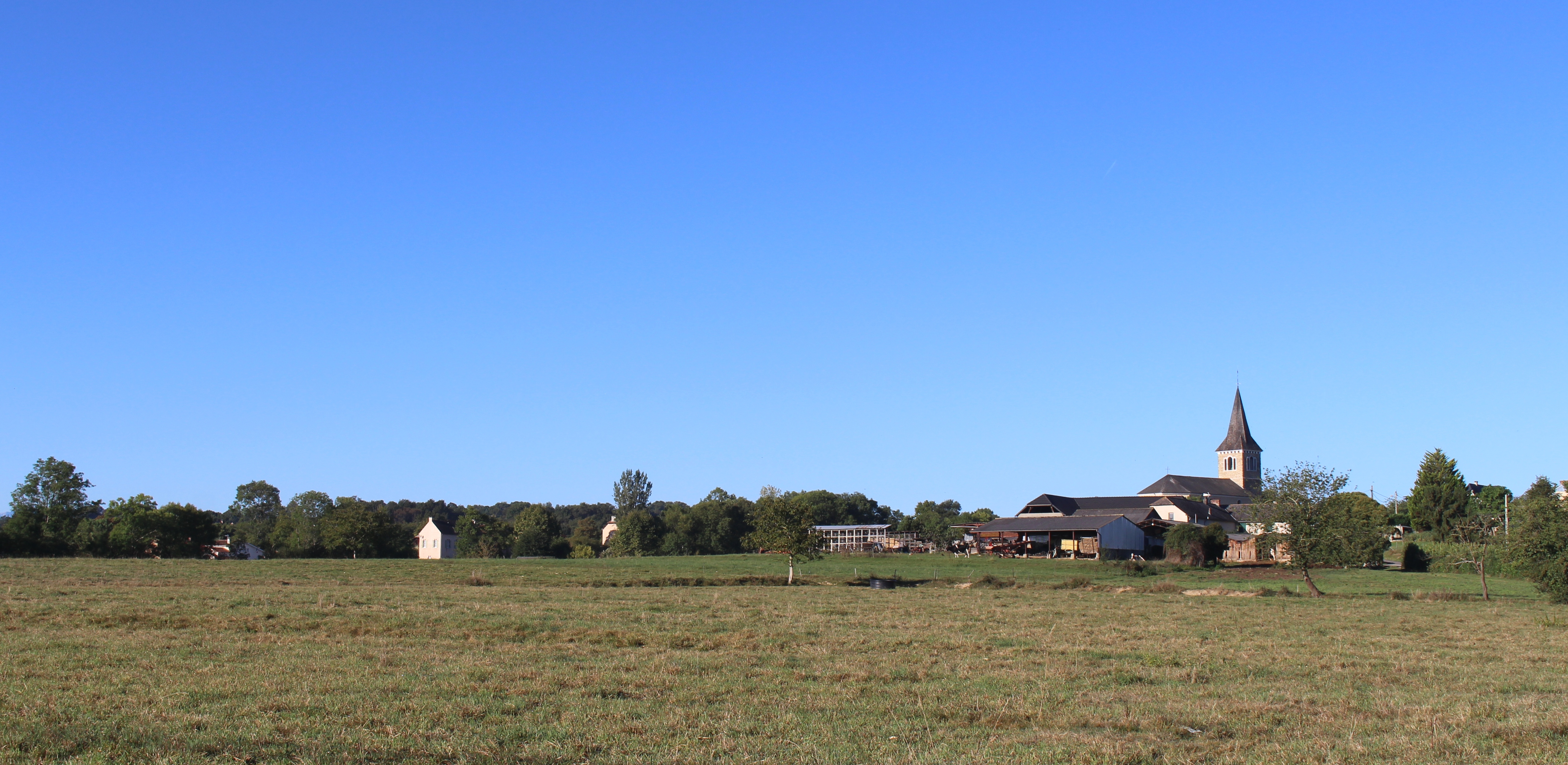 Laslades (Hautes-Pyrénées)